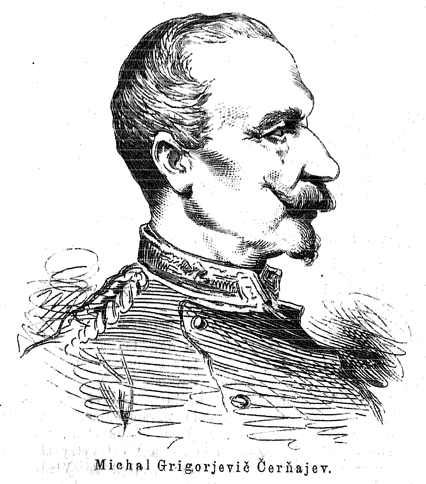 Portrait of Mikhail Chernyayev (Михайл Григорьевич Черняев, 1828 - 1898), Russian general.